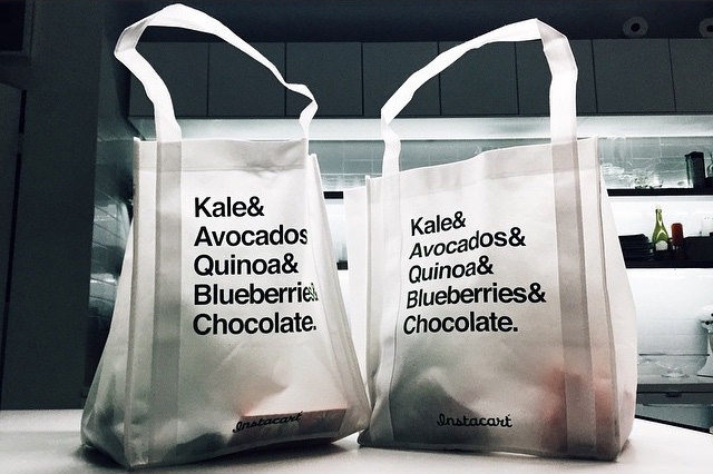 @Instacart is magic! 🍎🍏🍊